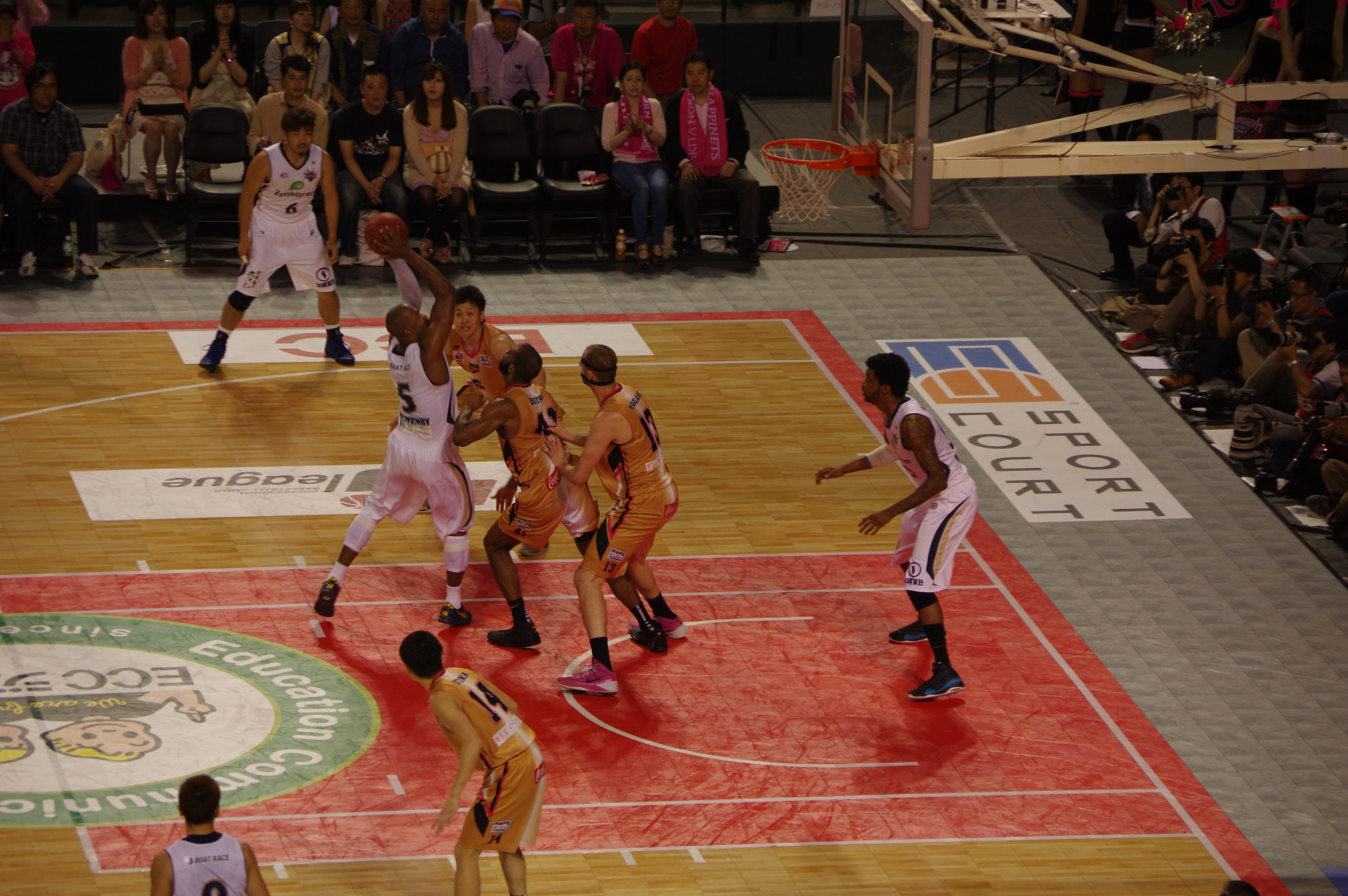 ｂｊリーグ 2013-2014シーズン プレイオフ ファイナルズ_024